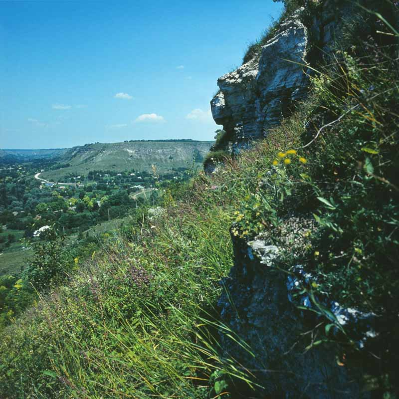 Camenca district.